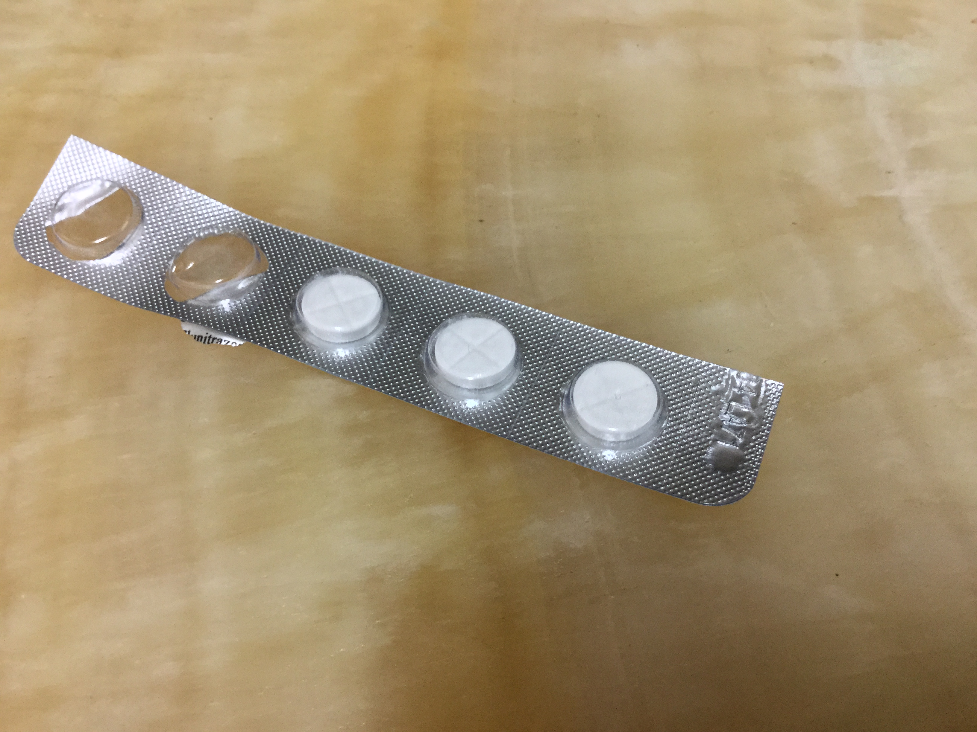 治療睡眠的藥物，含有 Flunittrszoprm，背面印有十字刻痕